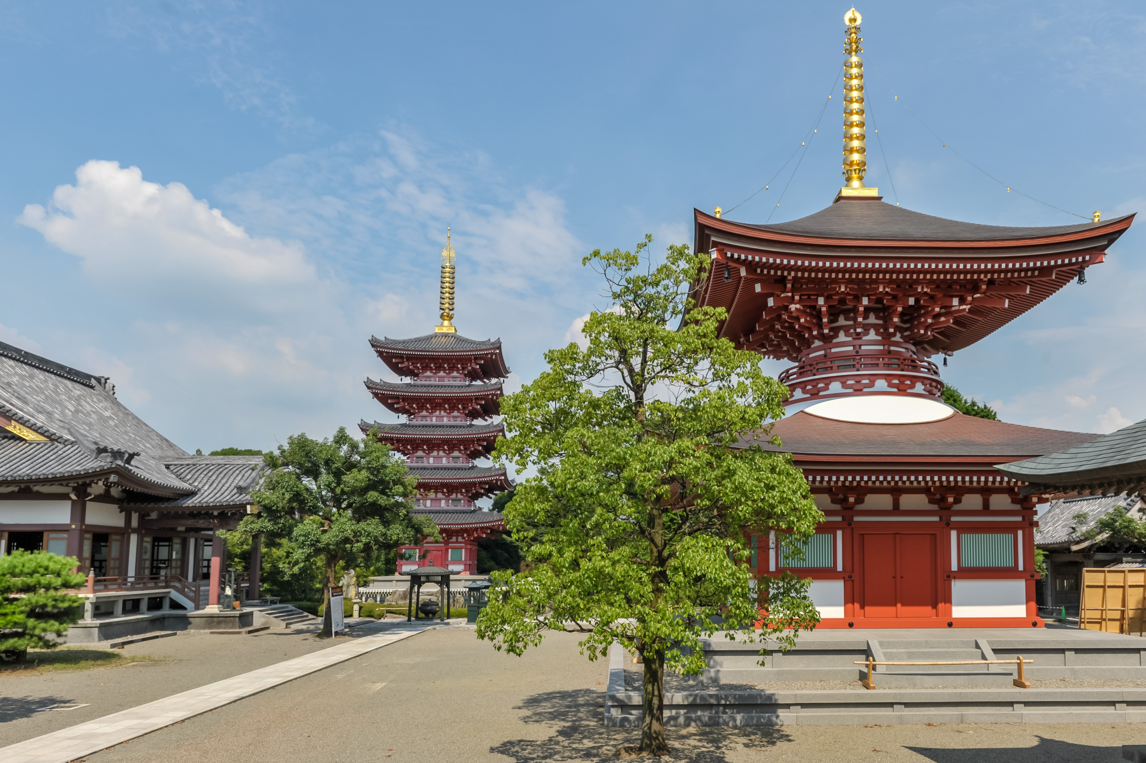 蓮華院誕生寺本院の多宝塔・五重塔・本堂